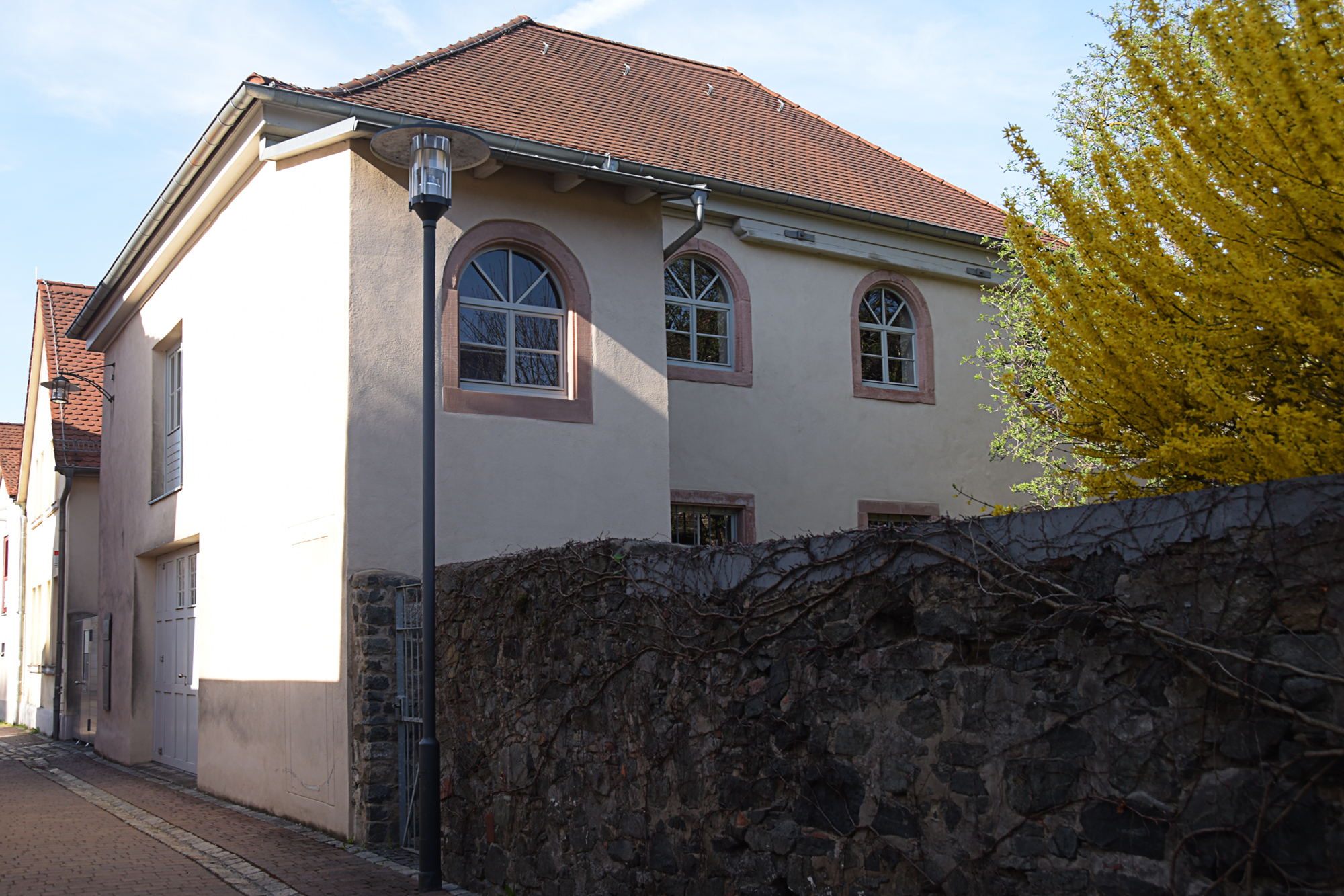 Denkmalgeschütztes Gebäude in Pfungstadt, ehem. Synagoge, Hillgasse 8a